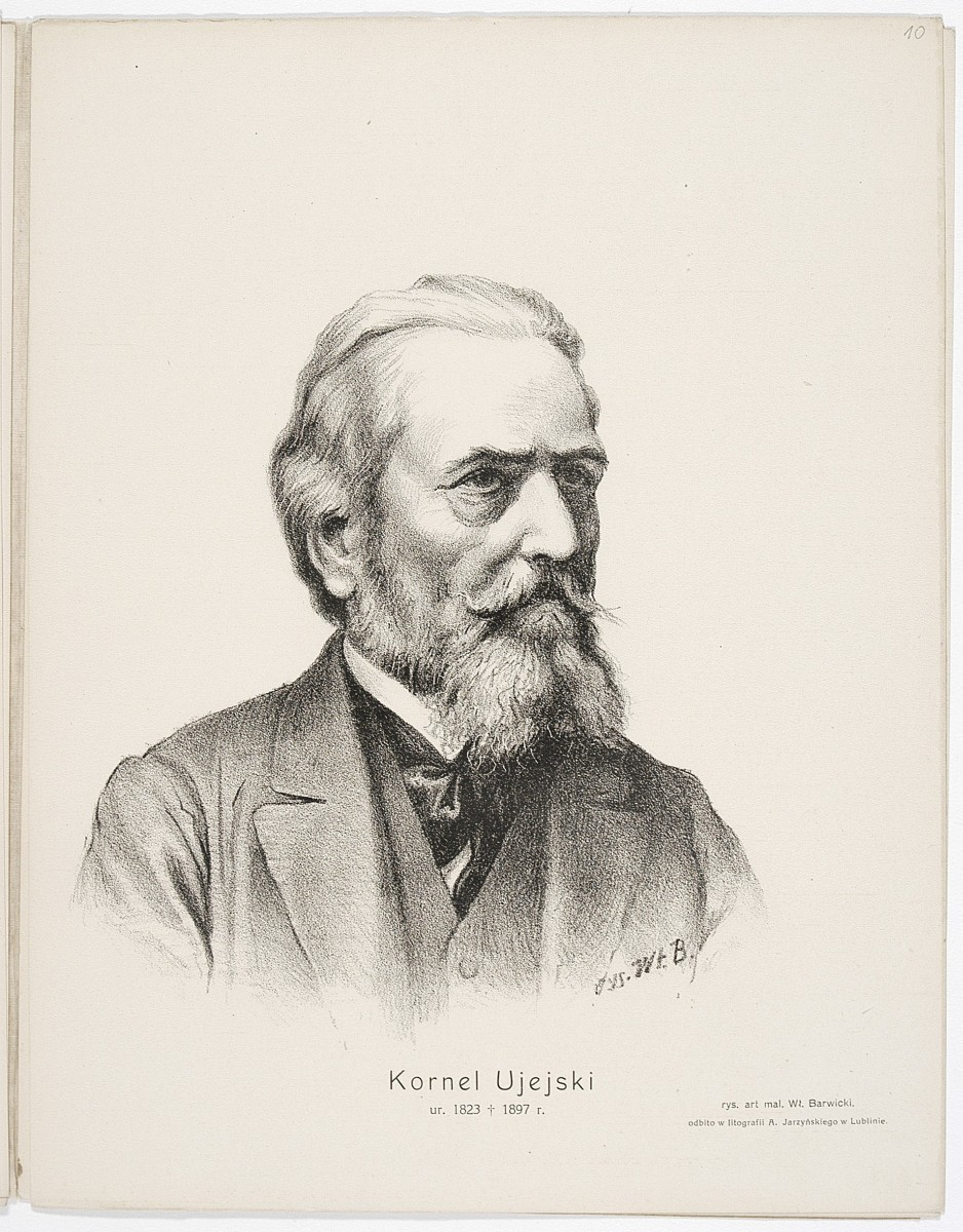 Kornel Ujejski portrait from CBN Polona